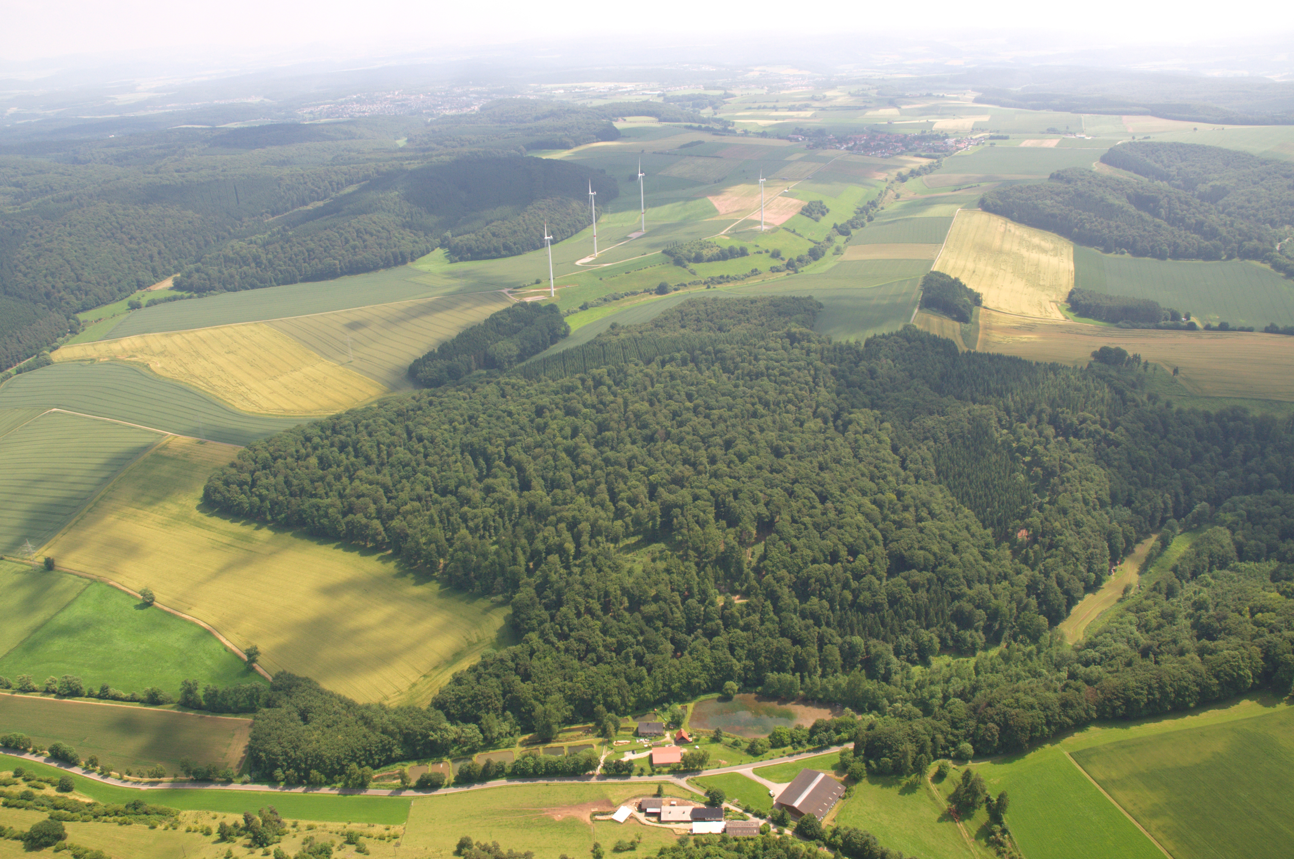 Fotofug Sauerland-Ost: Udorfer Mühle, Naturschutzgebiet Schuberstein (HSK-378) rechts gtrennt vom Naturschutzgebiet Kittenberg (HSK-029) durch das Orpetal Blickrichtung Südosten. The making of this document was supported by the Community-Budget of Wikimedia Germany.